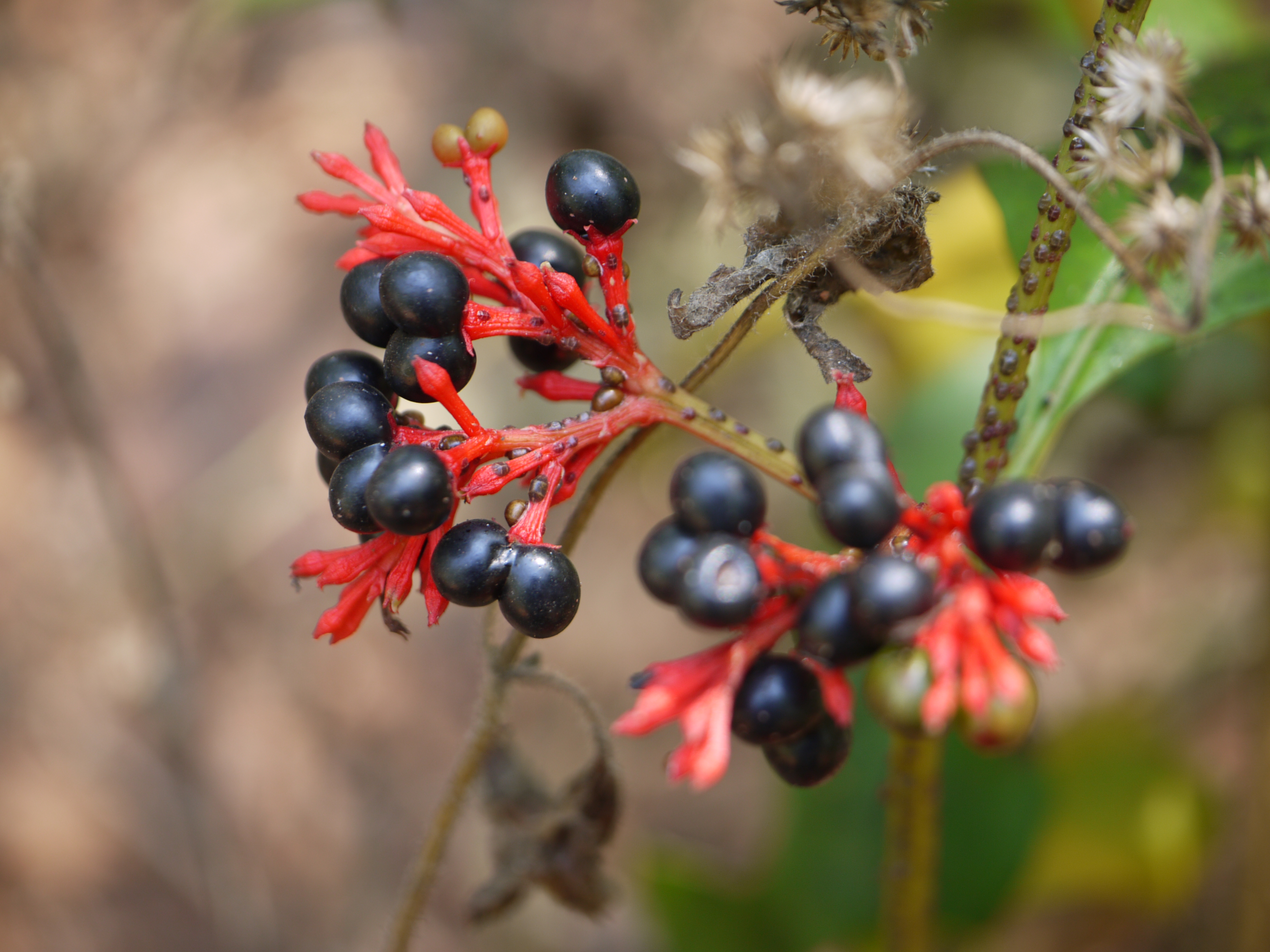 Apocynaceae (dogbane, or oleander family) » Rauvolfia serpentina raau-FO-feeah -- named for Leonhard Rauwolf, German physician, botanist and traveller ser-pen-TEE-nuh -- from Latin serpentine, referring to a snake commonly known as: Indian snakeroot, java devil pepper, ichneumon-plant, insanity herb, rauvolfia root, rauwolfia, serpentine wood, snakeroot, snakewood • Assamese: arachoritita • Bengali: চন্দ্র chandra • Gujarati: સર્પગંધા sarpagandha • Hindi: chandrabhaga, छोटा चांद chota-chand, नाकुली nakuli, सर्पगंधा sarpagandha • Kannada: ಸರ್ಪಗನ್ಧ sarpangandha, ಸರ್ಪಗನ್ಧೀ sarpagandhi, ಶಿವನಾಭಿಬಳ್ಳಿ shivanabhiballi, sutranavi, ಪತಾಳಗನ್ಧೀ patalagandhi • Malayalam: അമല്പൊരി amalpori, chuvannavilpori, സര്പ്പഗന്ധി sarppagandhi, suvapavalporiyam • Marathi: harkaya, harki, नाकुली nakuli • Oriya: patalagarar, sanochado • Sanskrit: चन्द्रिका chandrika, नाकुली nakuli, पातालगरुड patalgaruda, सर्पगंधा sarpagandha • Tamil: chevanamalpodi • Telugu: patalaguni, patalagaruda, sarpagandha • Urdu: چاند چهوٿا chota chand, ناکلي nakuli Native of: s China, Indian Subcontinent, Indo-China, Malesia References: Flowers of India • NPGS / GRIN • Zipcode Zoo • M.M.P.N.D.